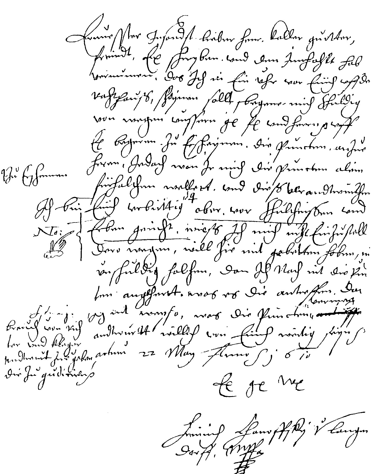 Schreiben des Heinrich Chanowsky an den Keller Georg Kling in Neuenstadt von 1610